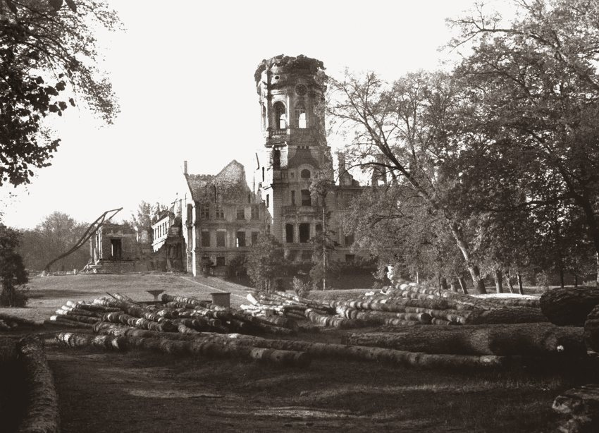 Schloss Neustrelitz Ruine 1949